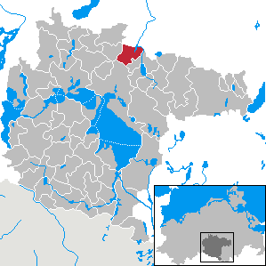 Lansen-Schönau im Landkreis Müritz, Mecklenburg-Vorpommern